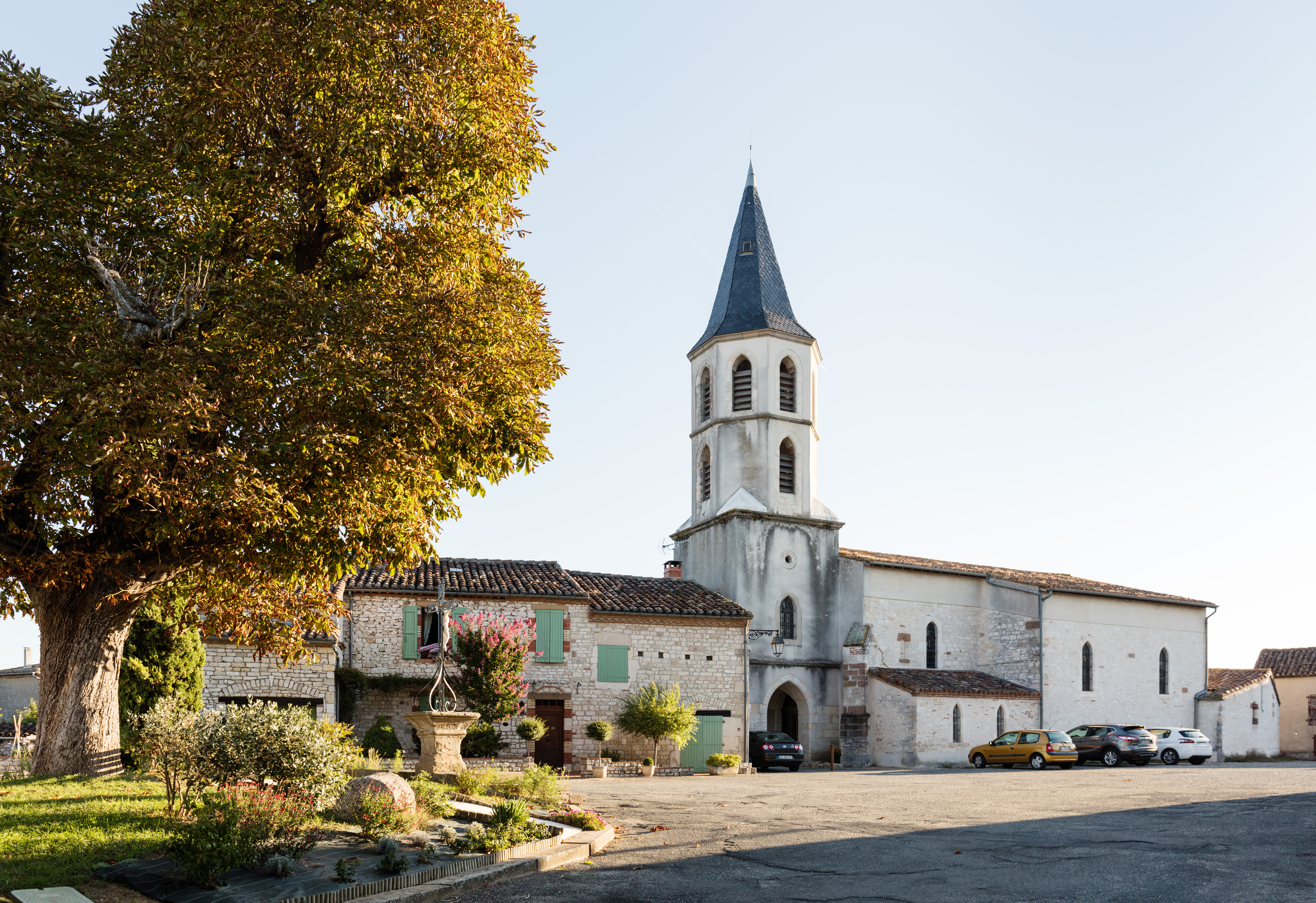 La place du village de Saint Sernin les Mailhoc dans la commune de Cagnac-les-Mines.